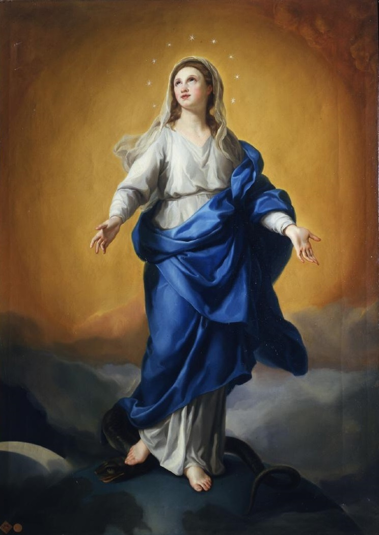 La obra representa la Inmaculada Concepción de la Virgen María, madre de Jesucristo.